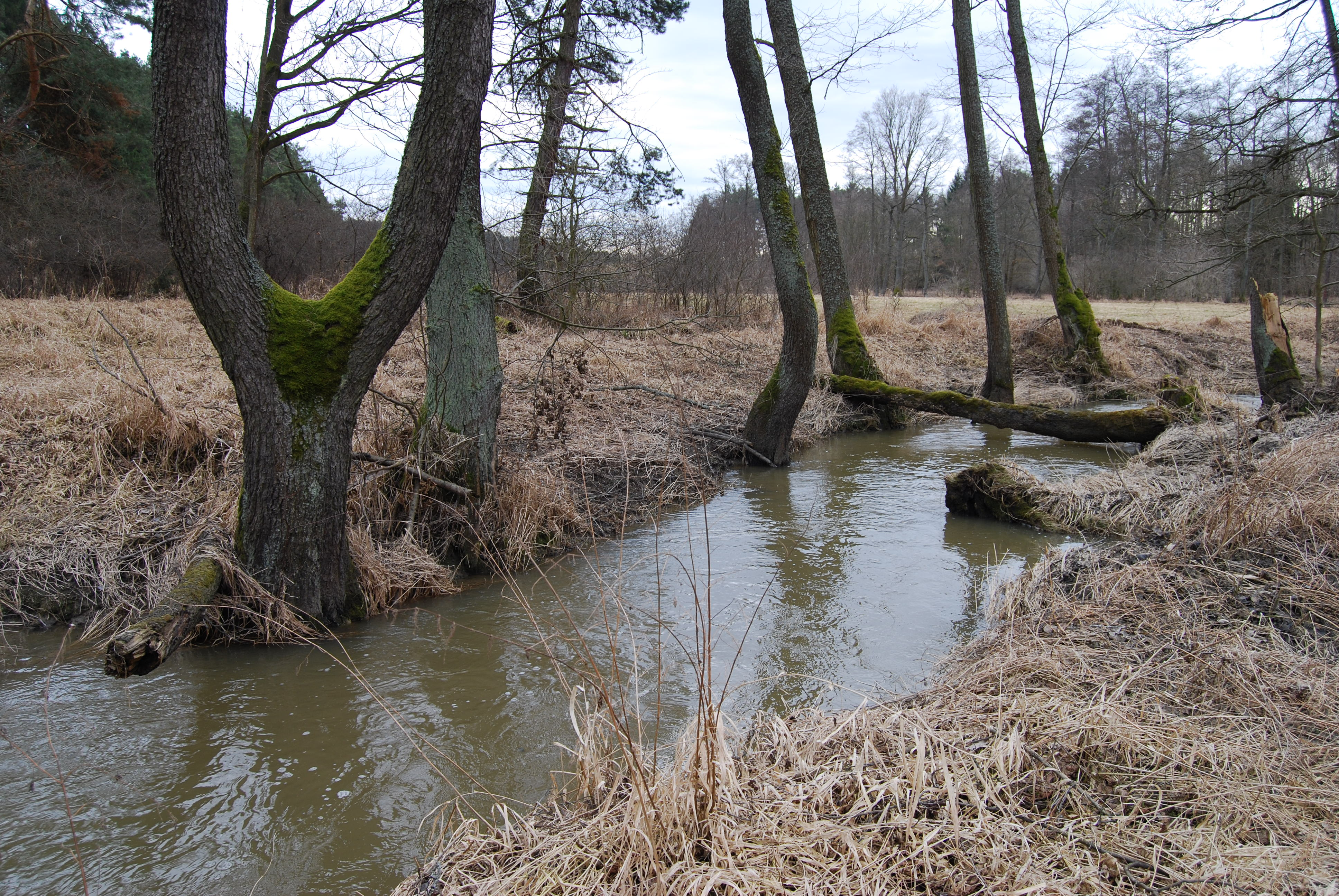 Bílinský potok. Přírodní park Plziny. Jihočeský kraj. Česká republika.